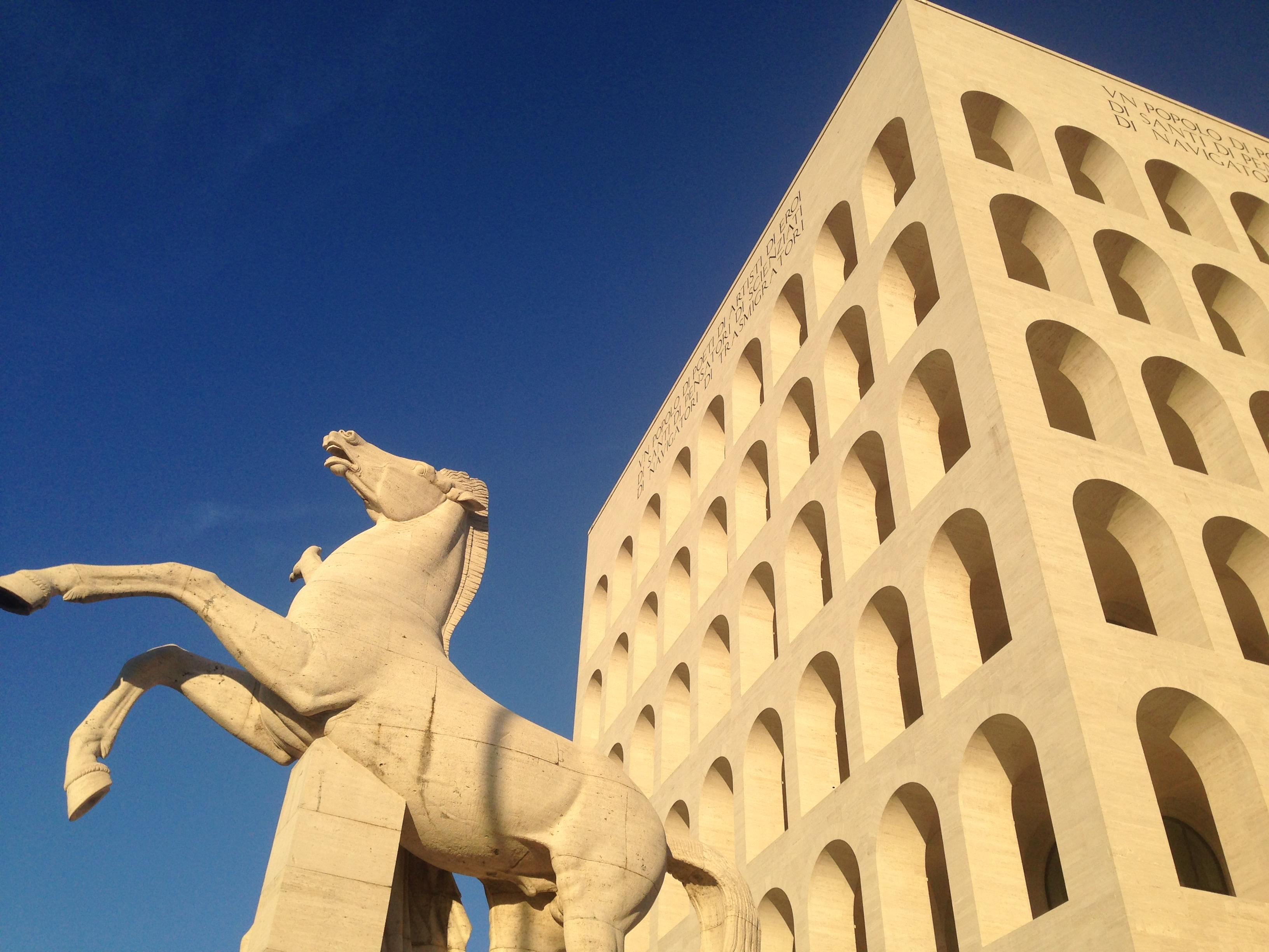 Uno dei quattro gruppi scultorei equestri di Publio Morbiducci e Alberto Felci, rappresentanti i Dioscuri.